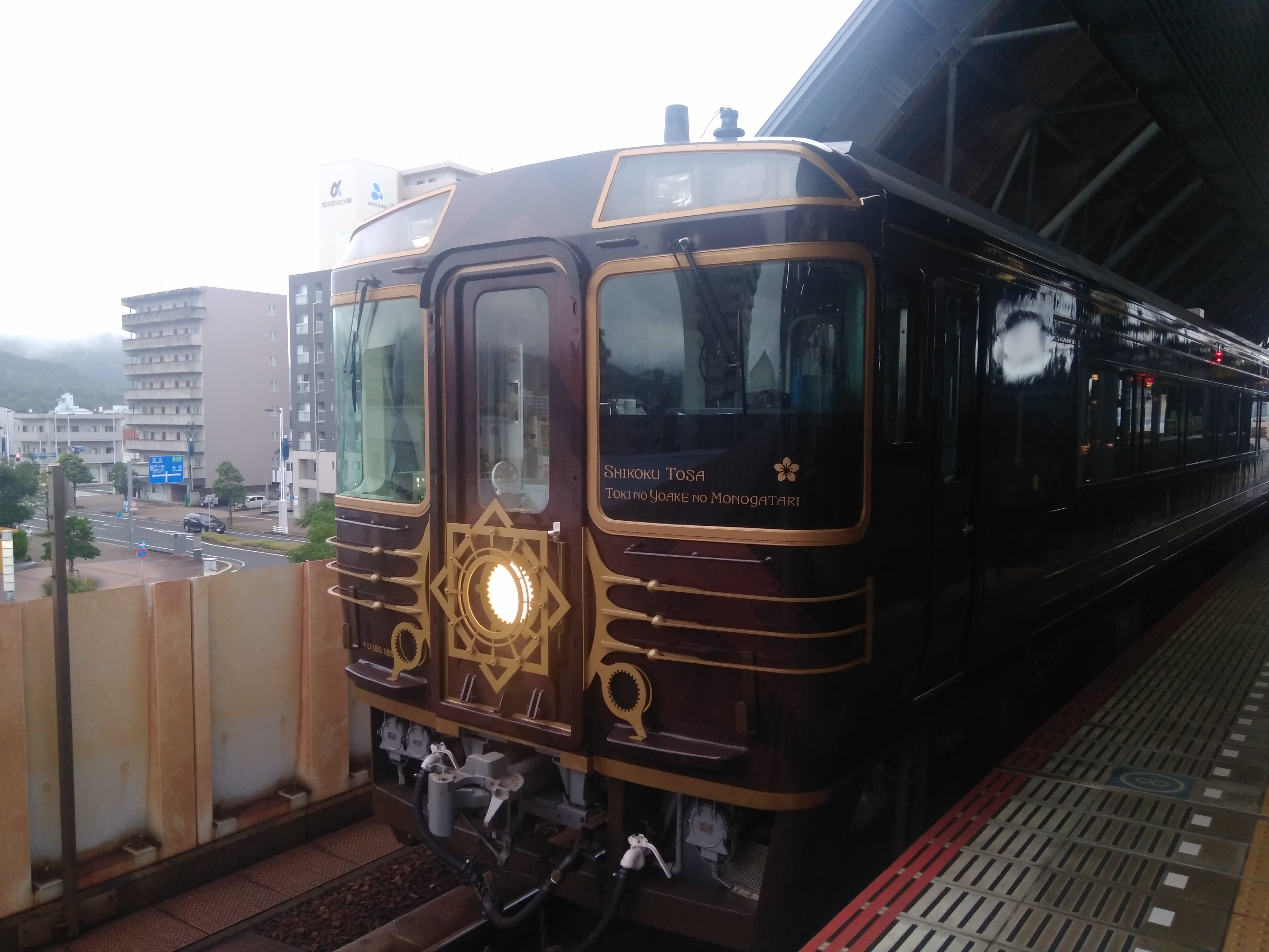 志国土佐 時代の夜明けのものがたり